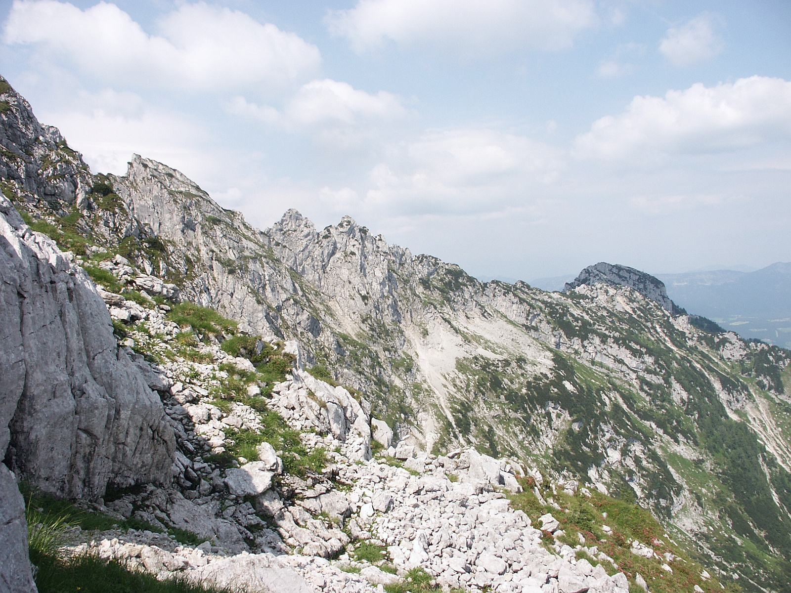 Mannlköpfe & Kehlstein, Berchtesgadender Alpen, Deutschland